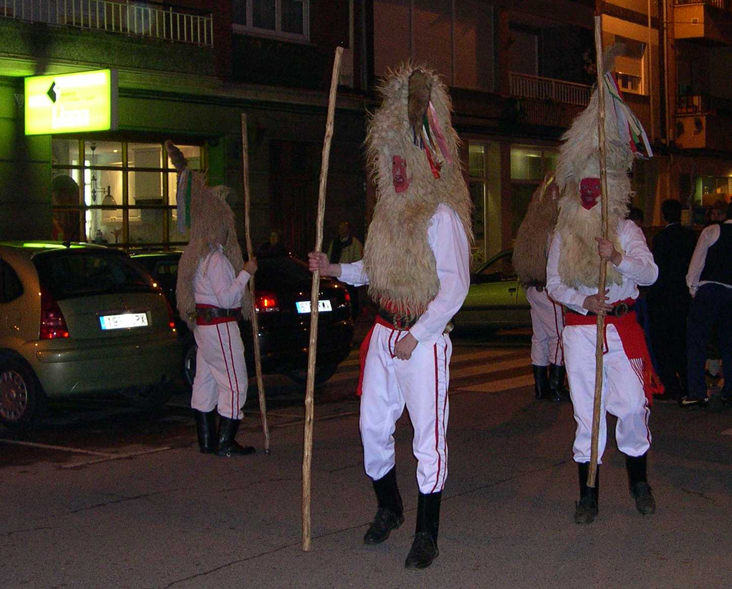 Guirrios nel Antroxu de Pola Siero, Asturies